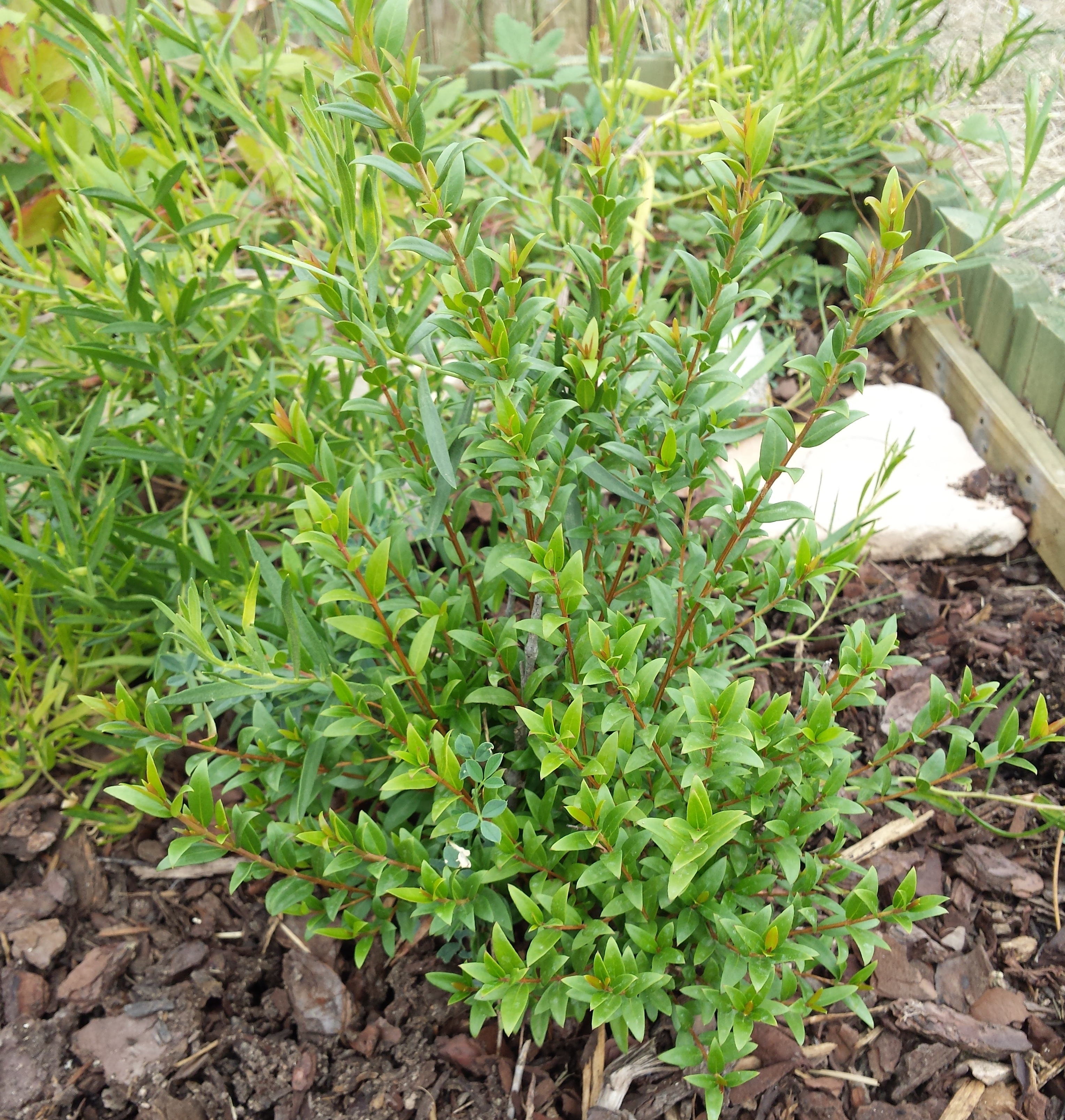 Murtra (Myrtus communis) de jardineria a Castelltallat